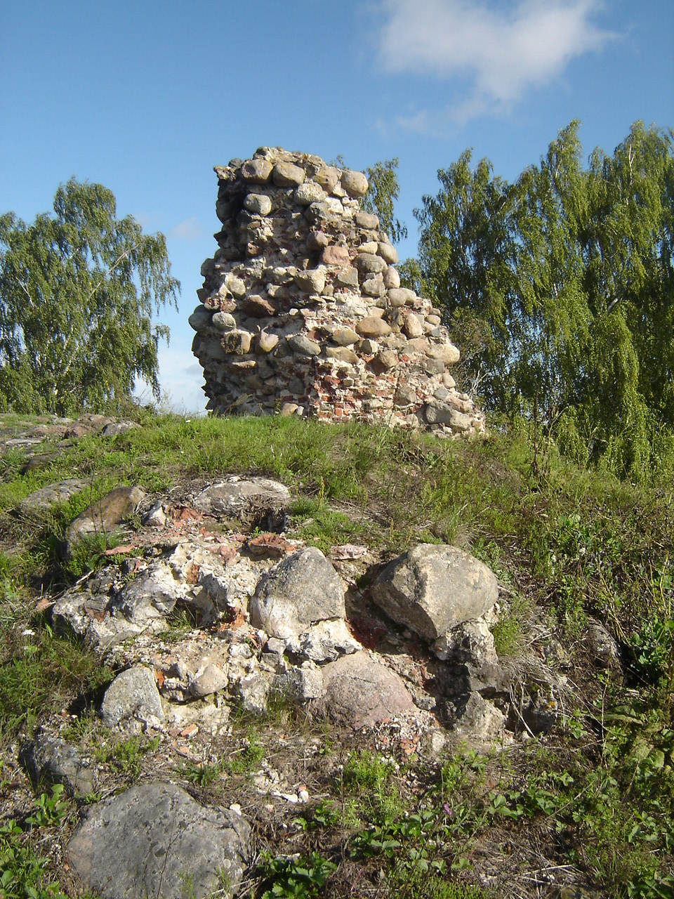 Linnuse üksikud müürid